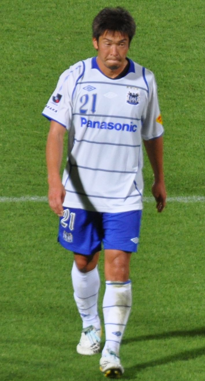 Akira Kaji cropped from Kawasaki Frontale vs Gamba Osaka_440